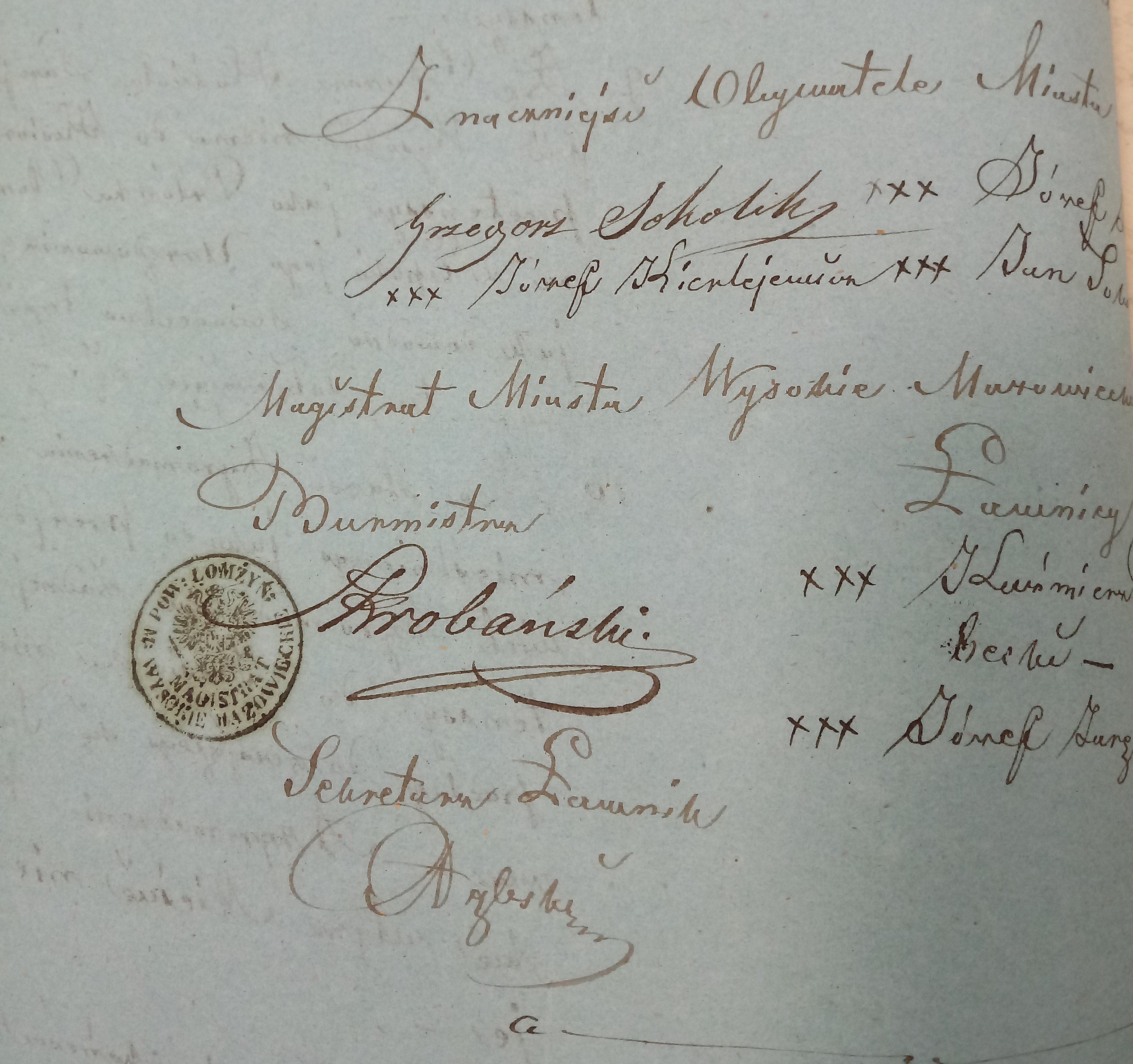 Burmistrz miasta Wysokie Mazowieckie od ok. 30 lipca 1863 r. Poprzednik Ludwik Kosiorek (od 1852 r.)